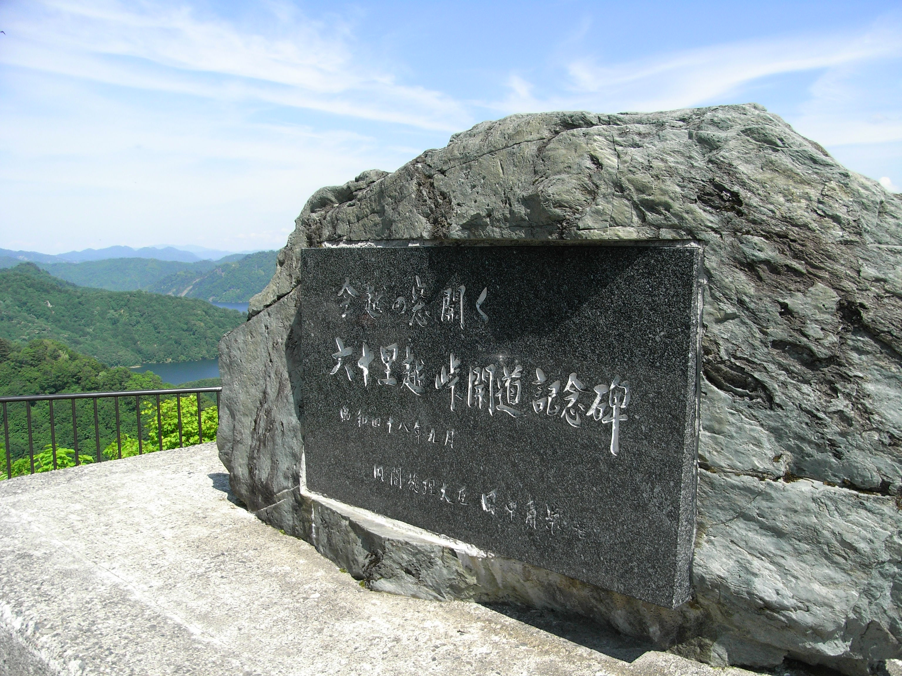 Lake